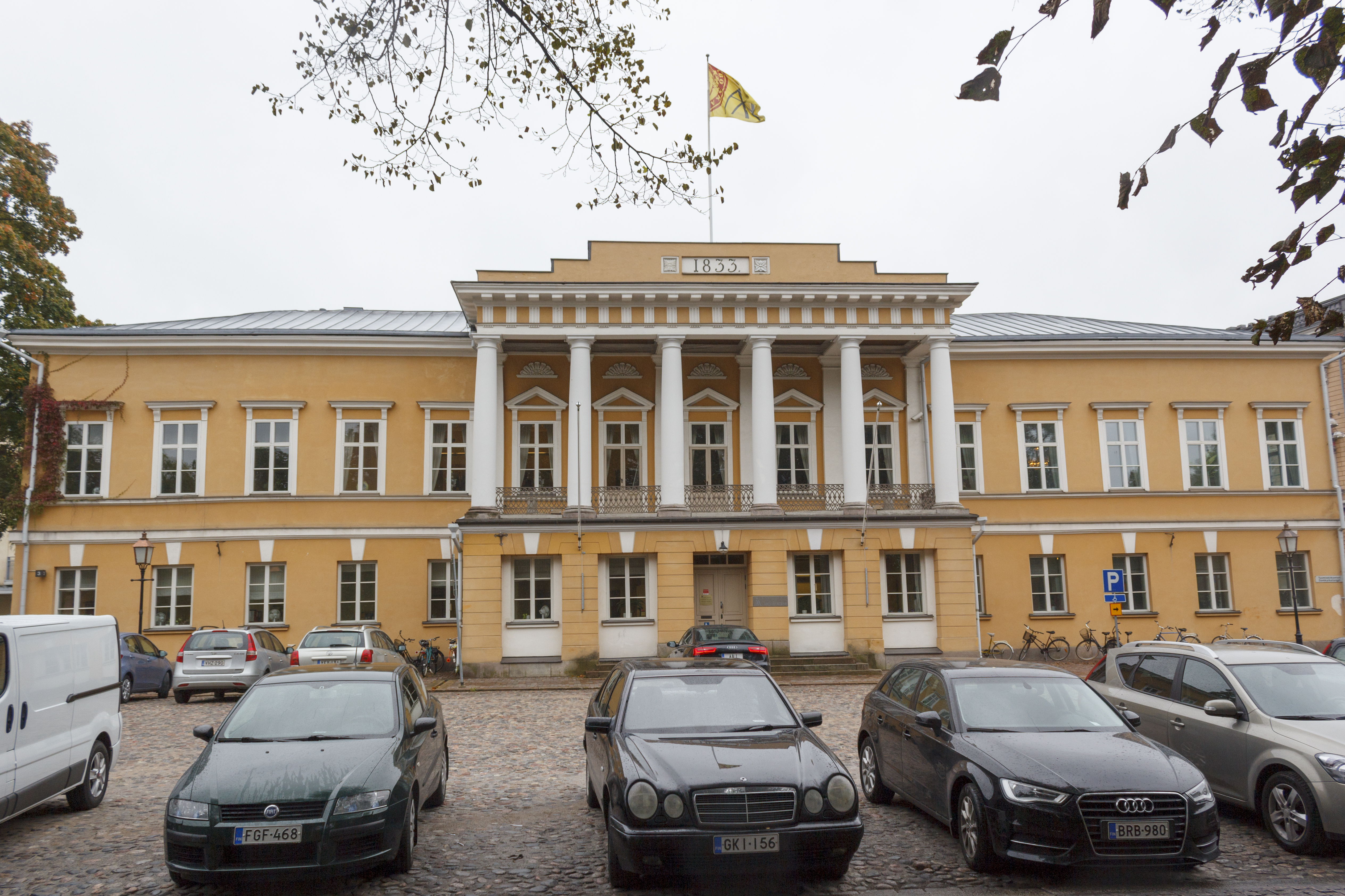 Foto de el edificio principal de la Univesidad Åbo Akademi en Turku, Finlandia.